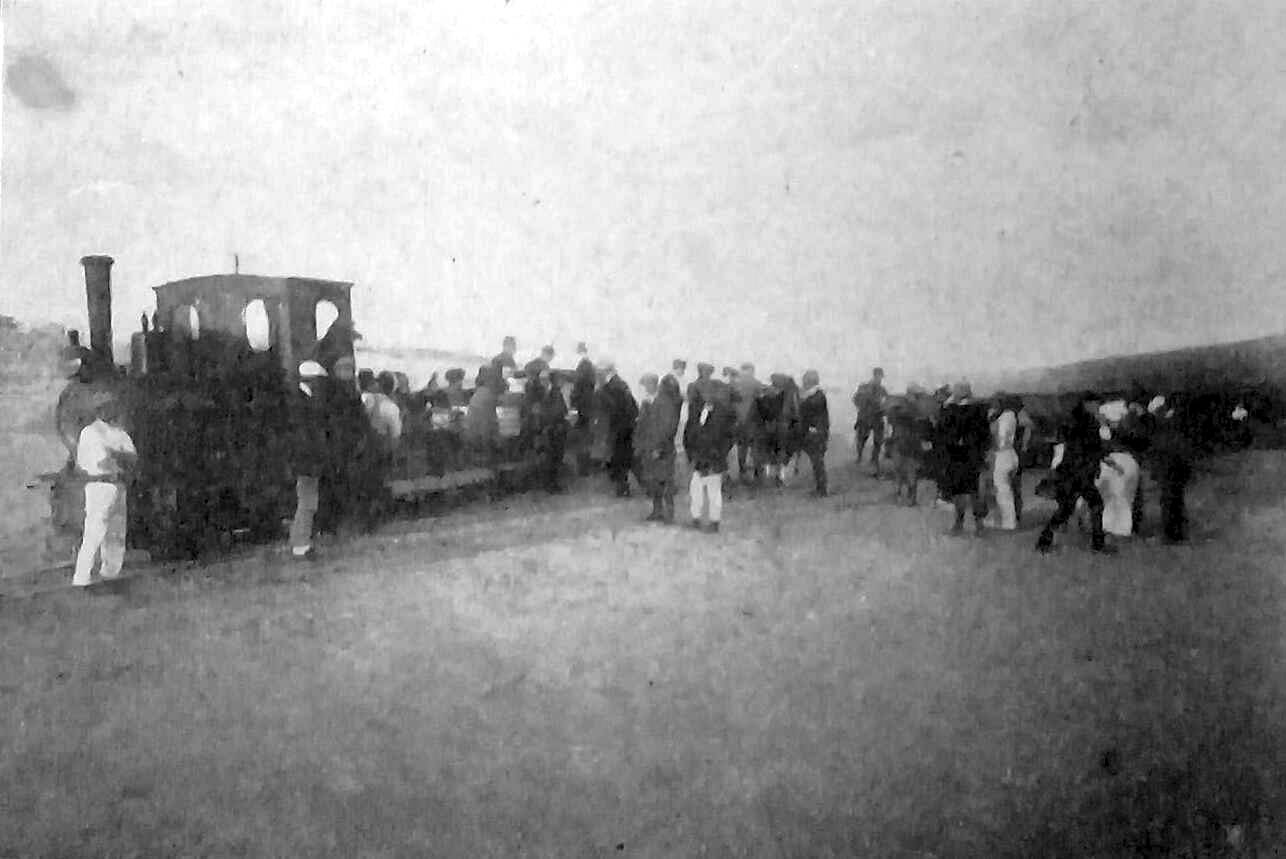 Decauville de Ostende (Revista Fray Mocho Nº 48 del 23 de Marzo de 1913 en la nota 'Las Pascuas en Ostende')